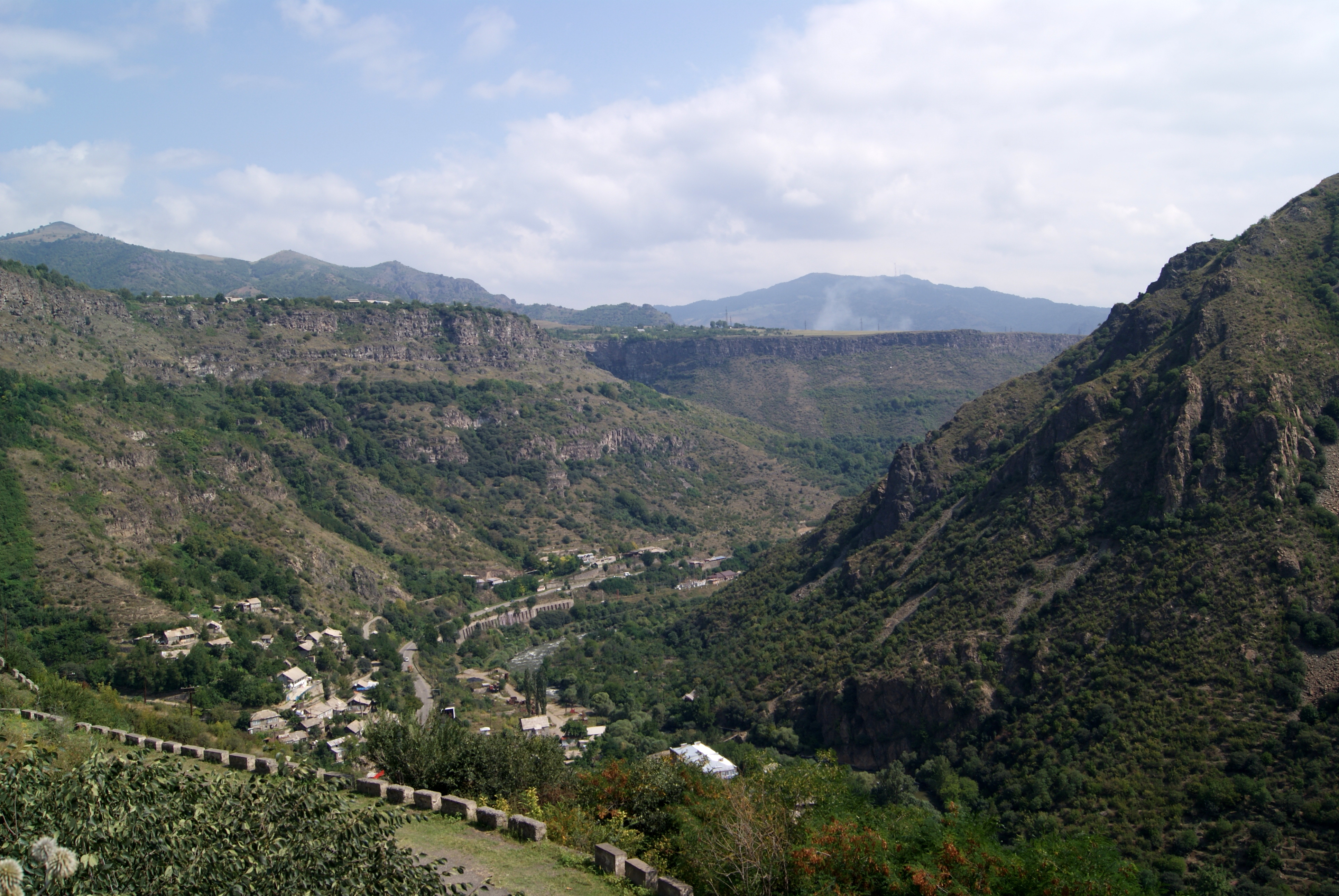 Լոռի, Լալվար